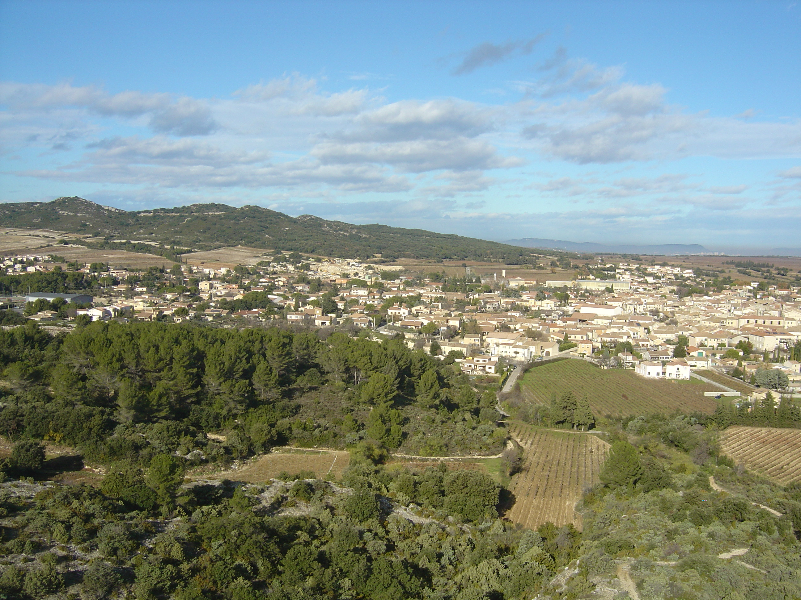 Vue générale de Tavel dans le Gard (30) depuis le château d'eau de l'aire d'autoroute